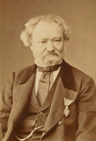 Erkel Ferenc portréja